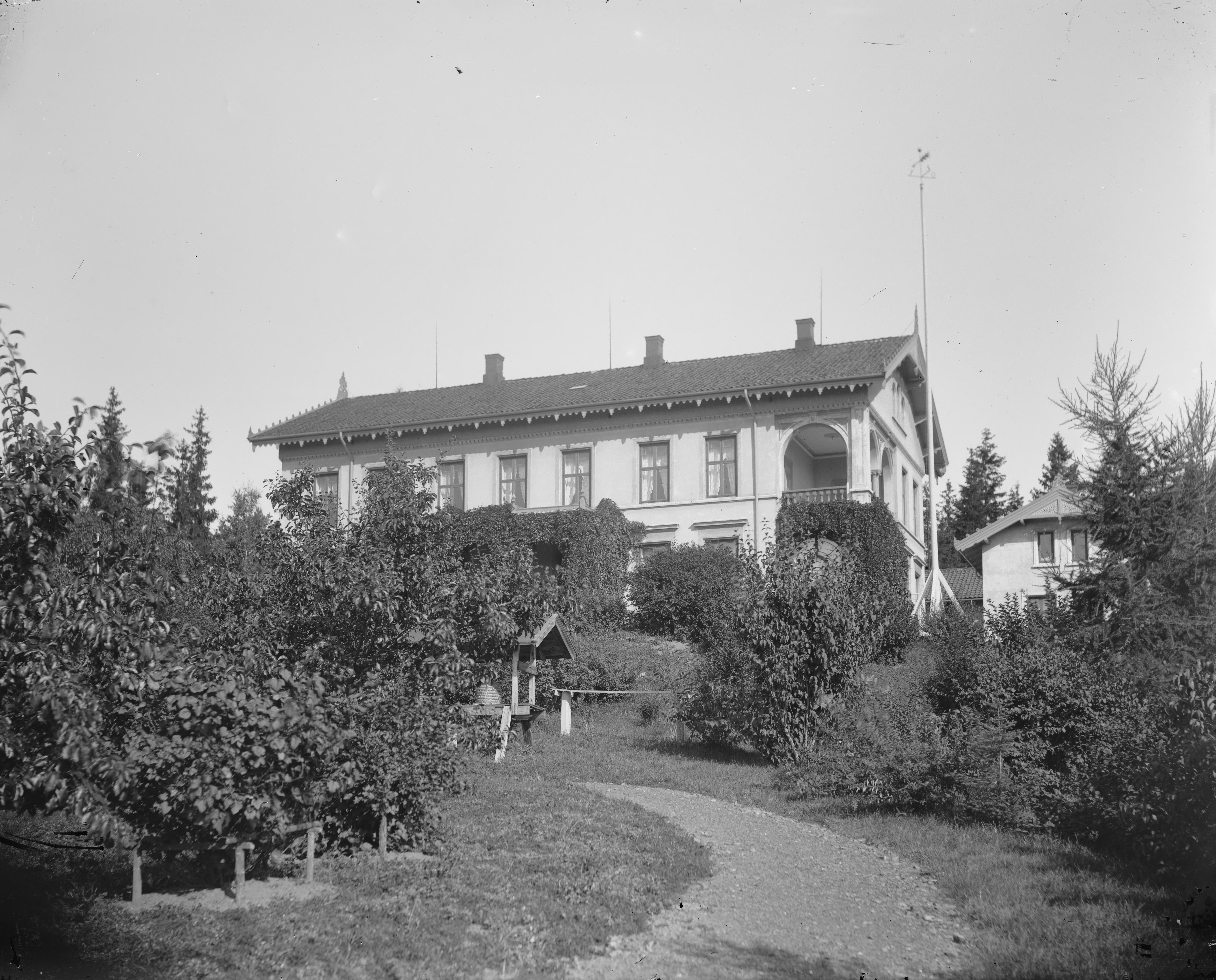 Påskrift konvolutt: B-46 V.Aker. Madserud allé 34. [Riksantikvaren] Sted: Skøyen,Vestre Aker Kommune: Oslo Fylke: Oslo Tagger: villa fasade hage v ngshus